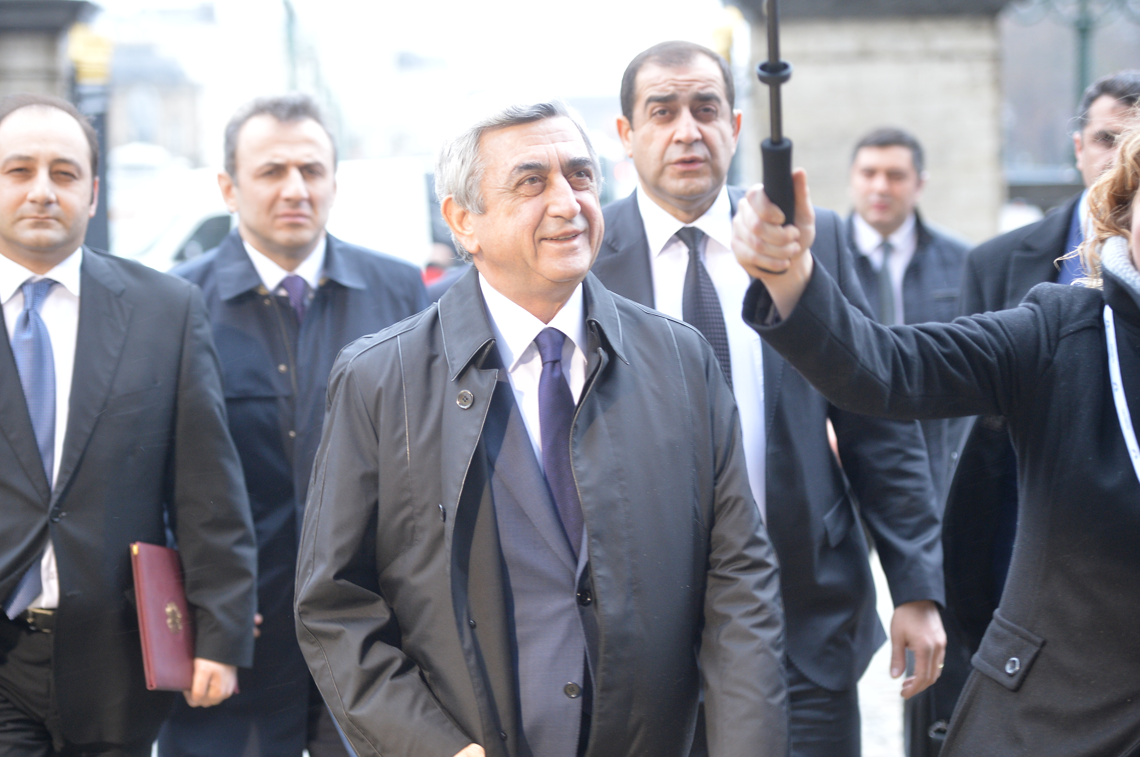 EPP Summit, Brussels; December 2014